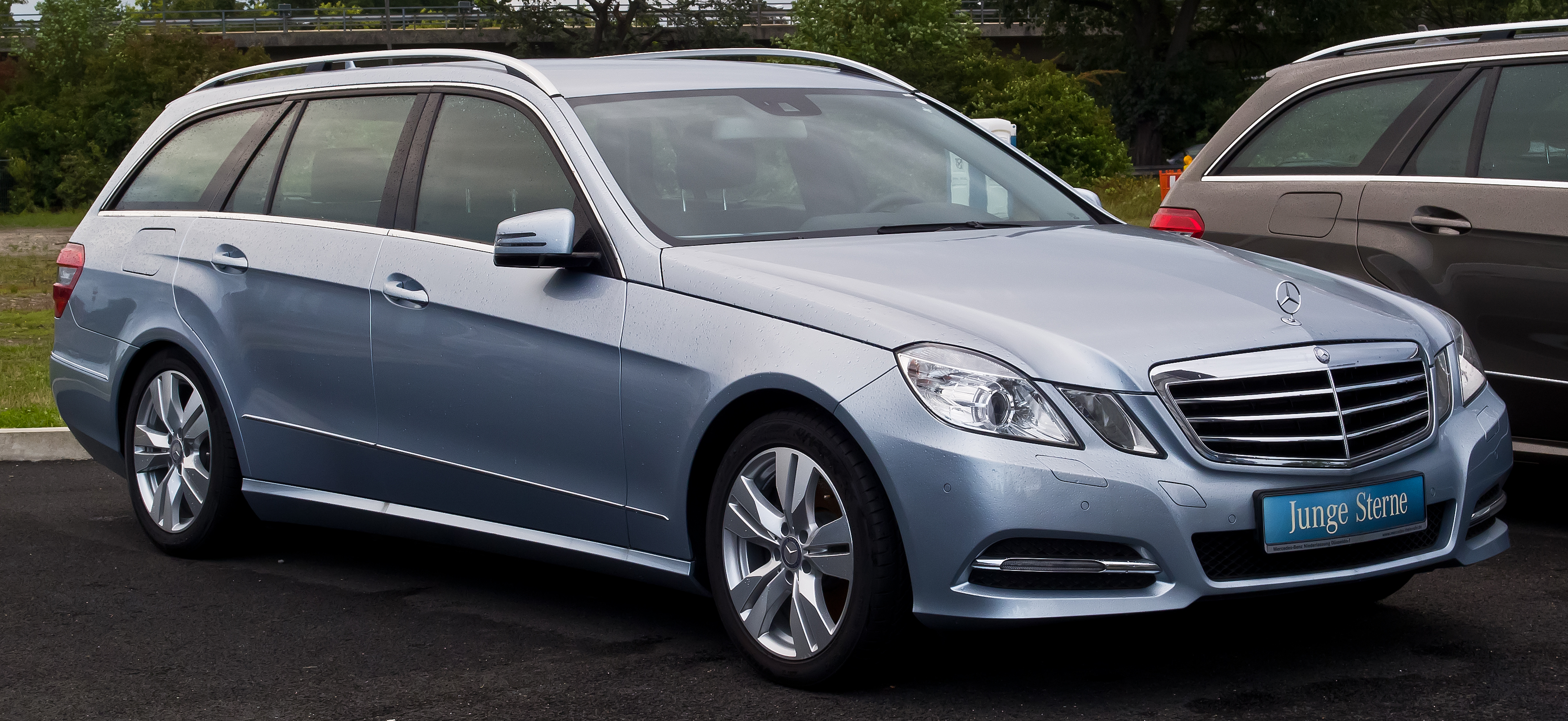 Mercedes-Benz E 300 CDI BlueEFFICIENCY T-Modell Avantgarde (S 212)